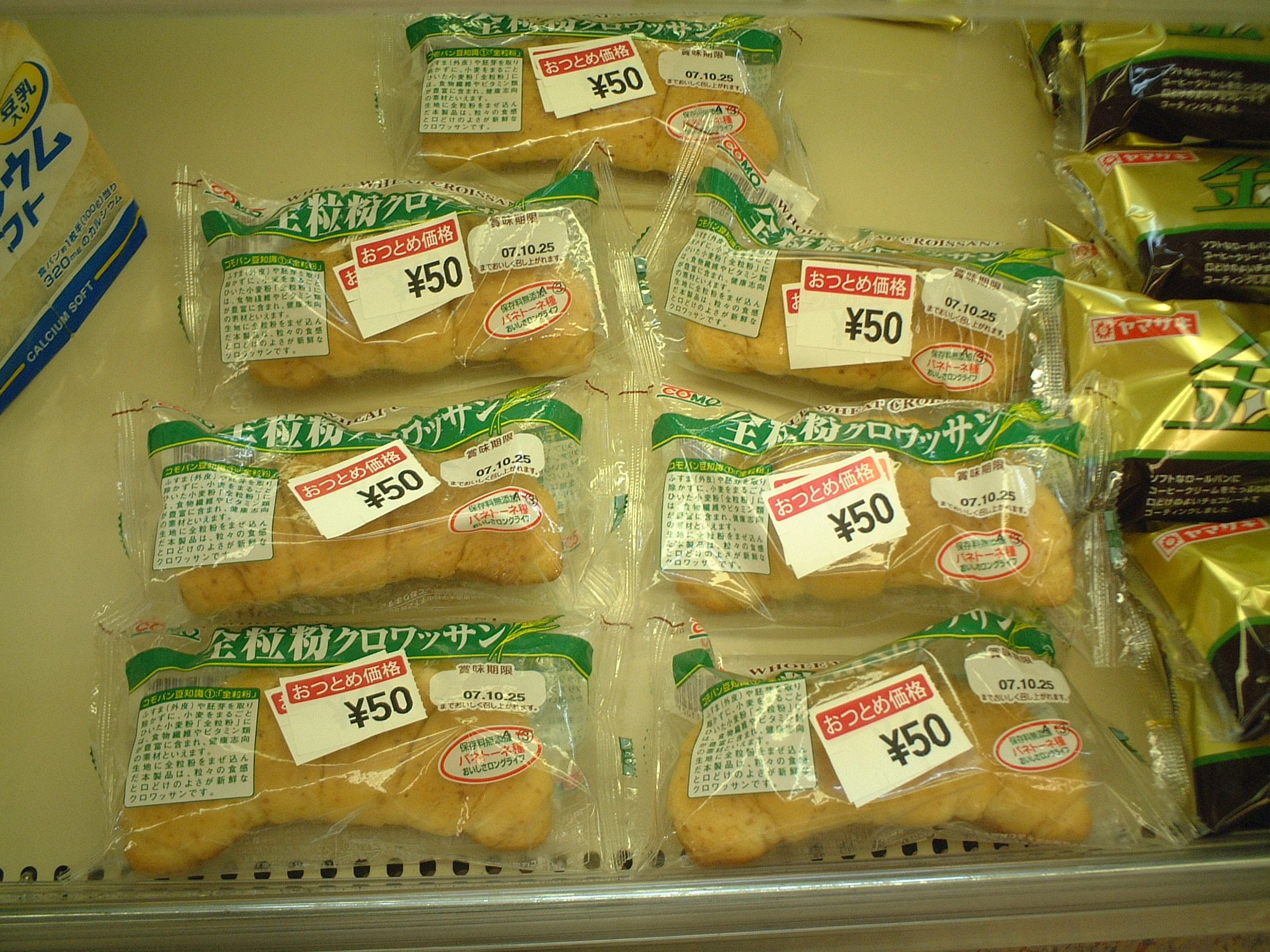 日本のスーパーマーケットのパン